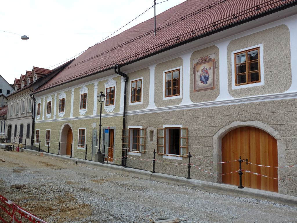 Hiša Janeza Mencingerja, Krško